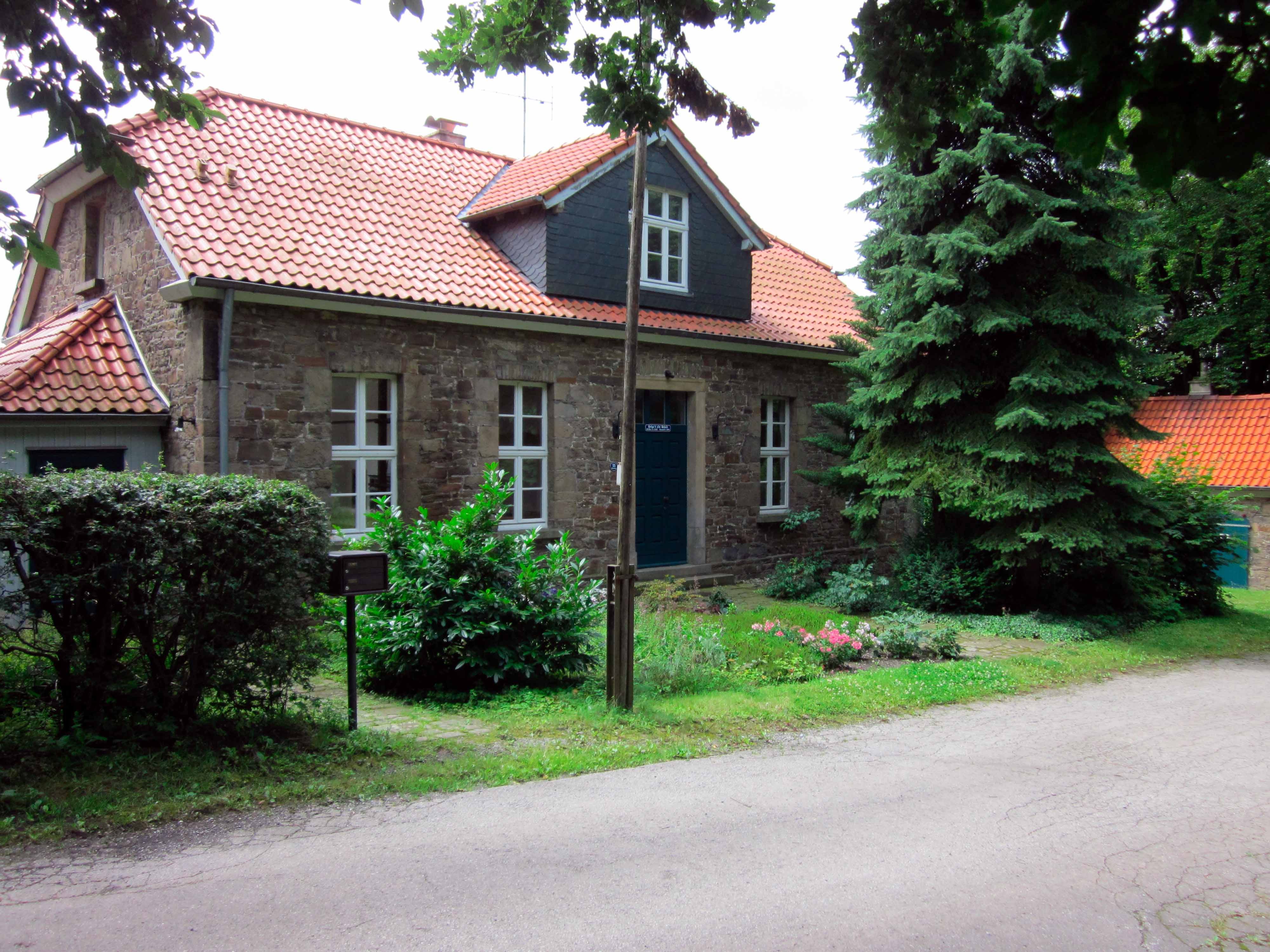 Szkoła gminy Rottberg